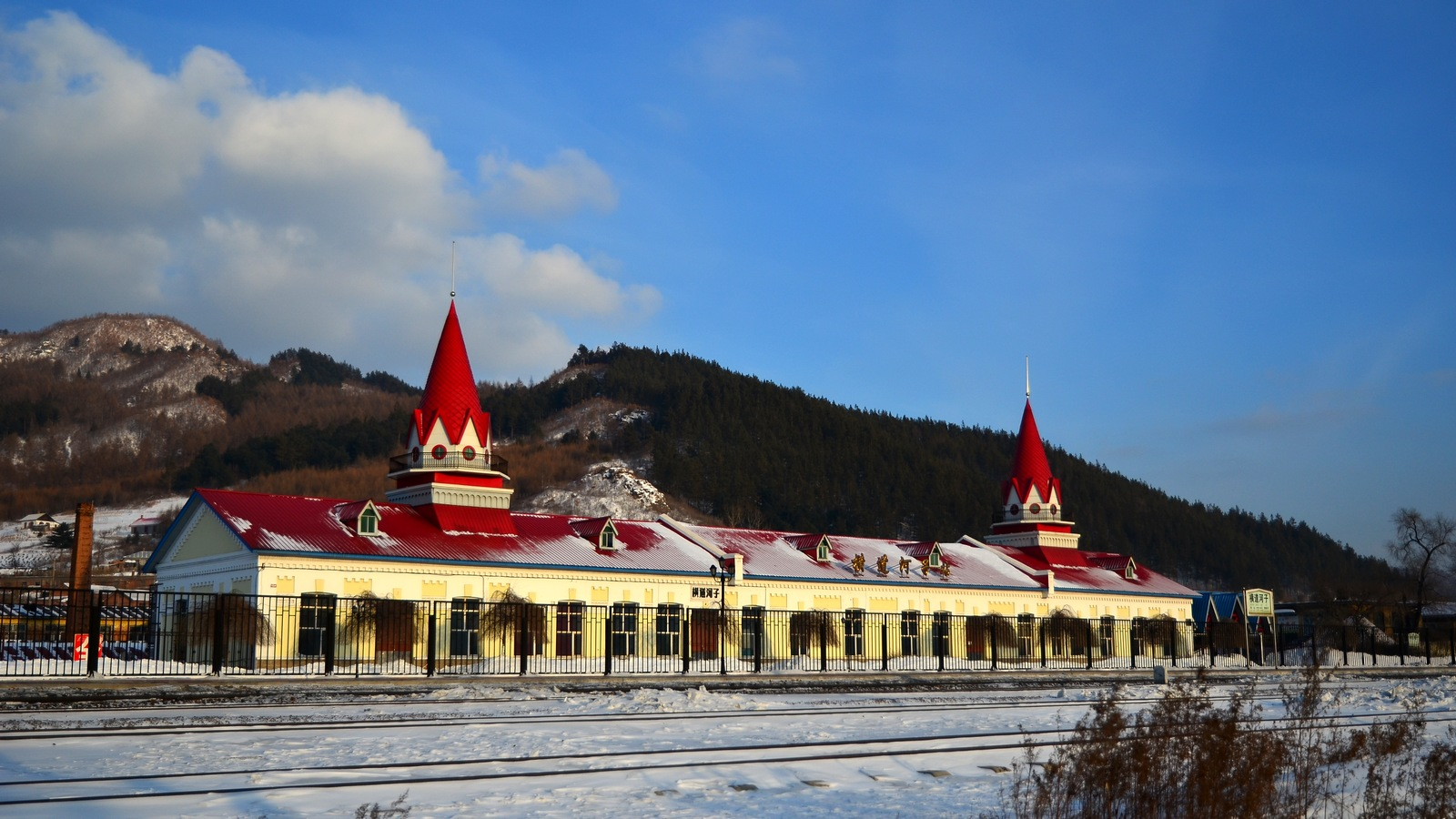 黑龙江省横道河子站